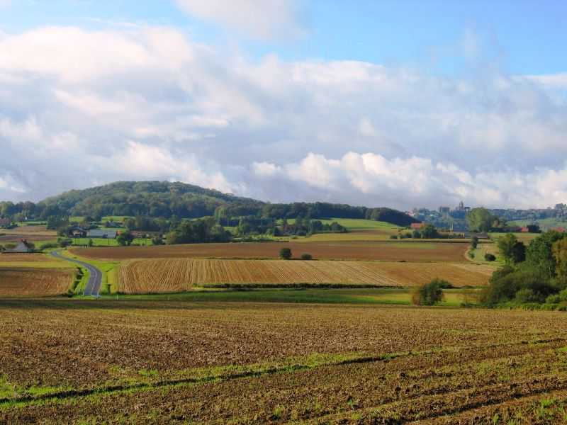 Wouwenberg en rechts Kassel - eigen foto